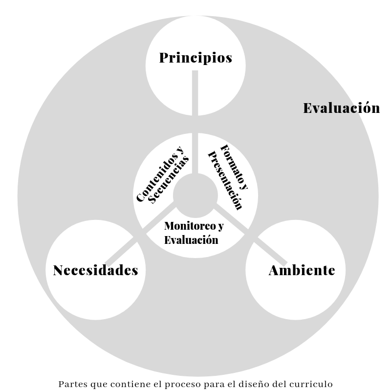 Partes del diseño del curriculo